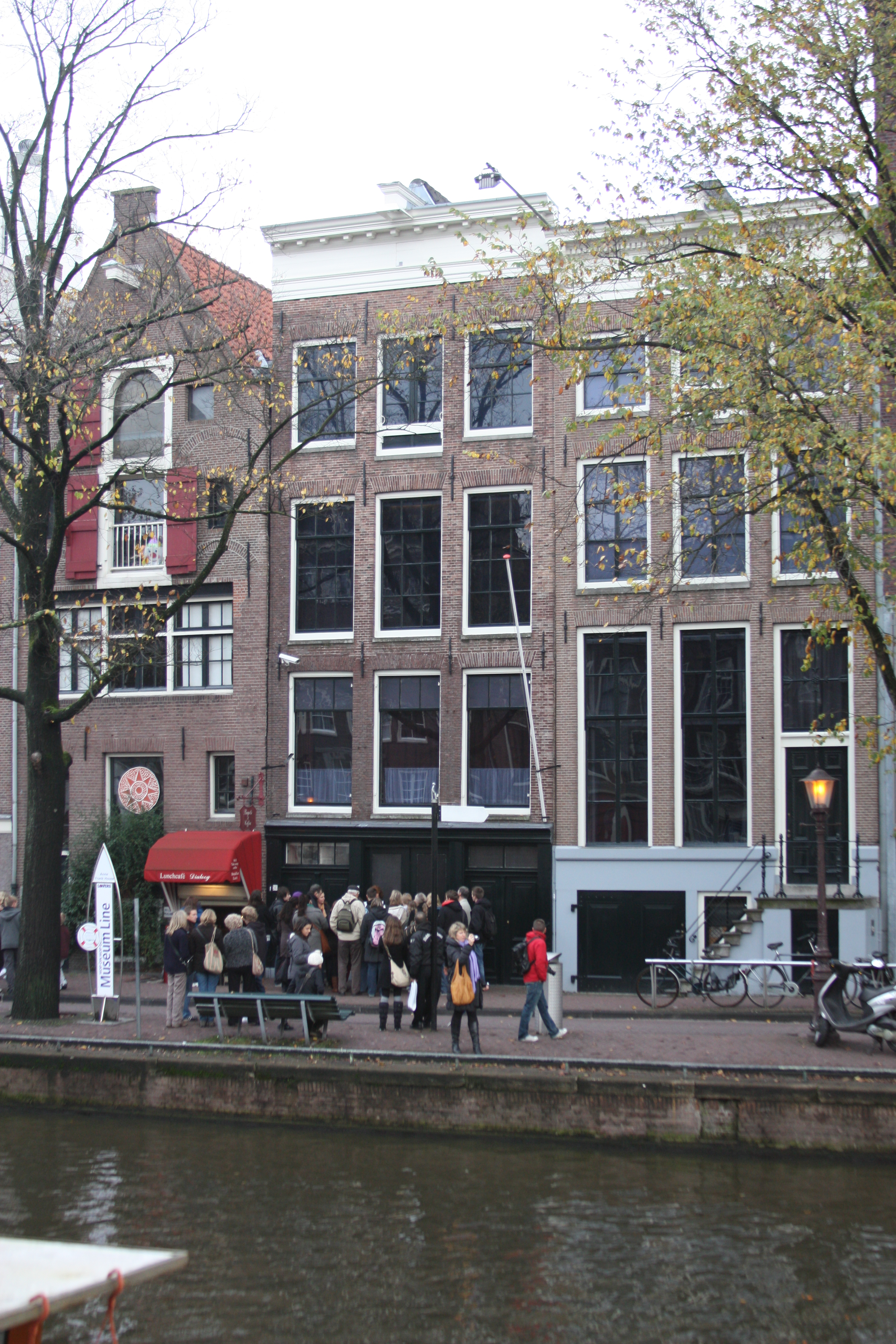 Amsterdam Zentrum